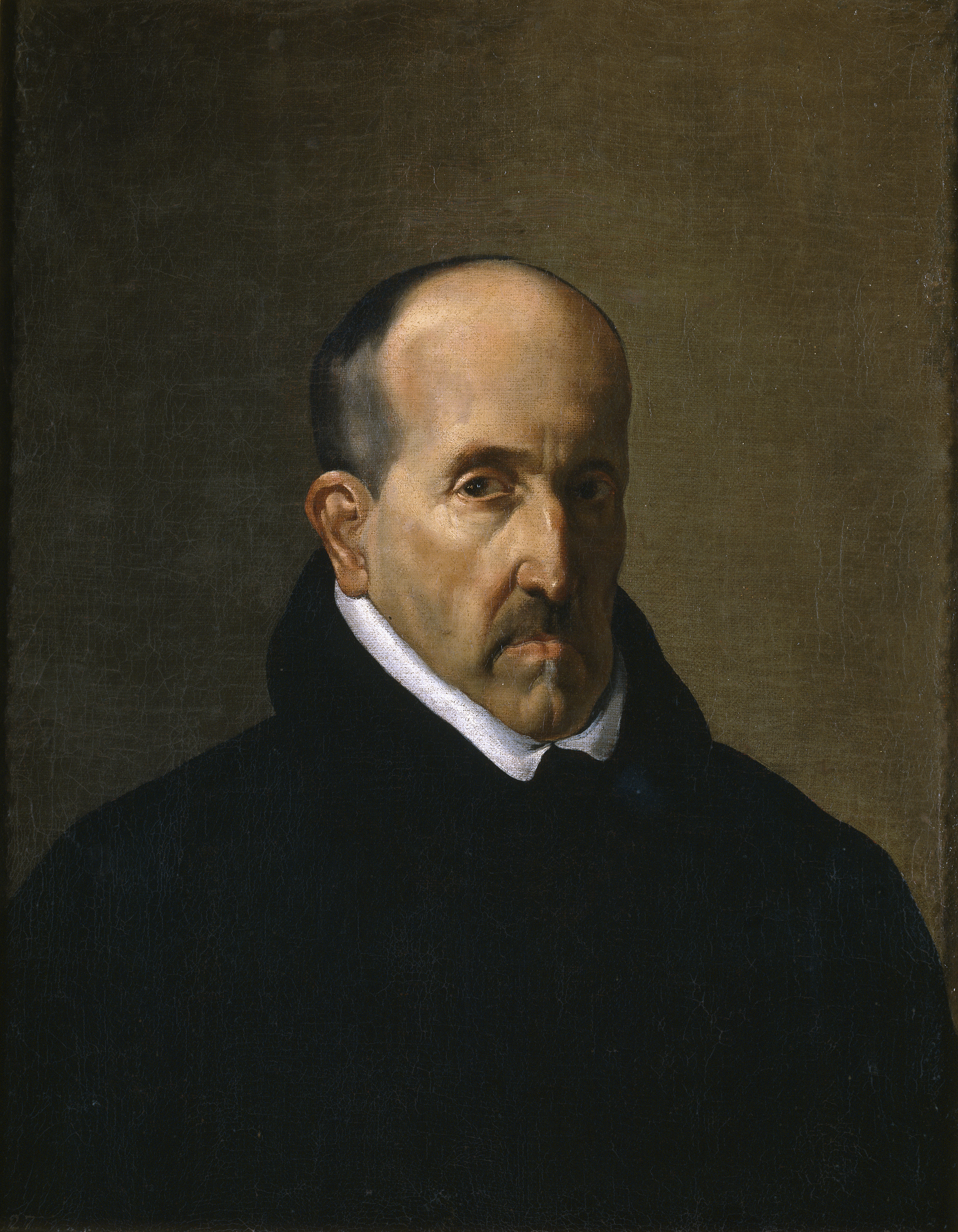 Retrato del célebre poeta y escritor español Luis de Góngora y Argote (1561-1627), enemigo acérrimo de Francisco de Quevedo y máximo exponente del culteranismo en España. Esta obra es una copia anónima del retrato que pintó Diego Velázquez en 1622 del poeta Luis de Góngora y que se conserva actualmente el Museo de Bellas Artes de Boston, aunque también existe otra réplica de la misma obra pero realizada en el taller de Velázquez en el Museo Lázaro Galdiano de Madrid.